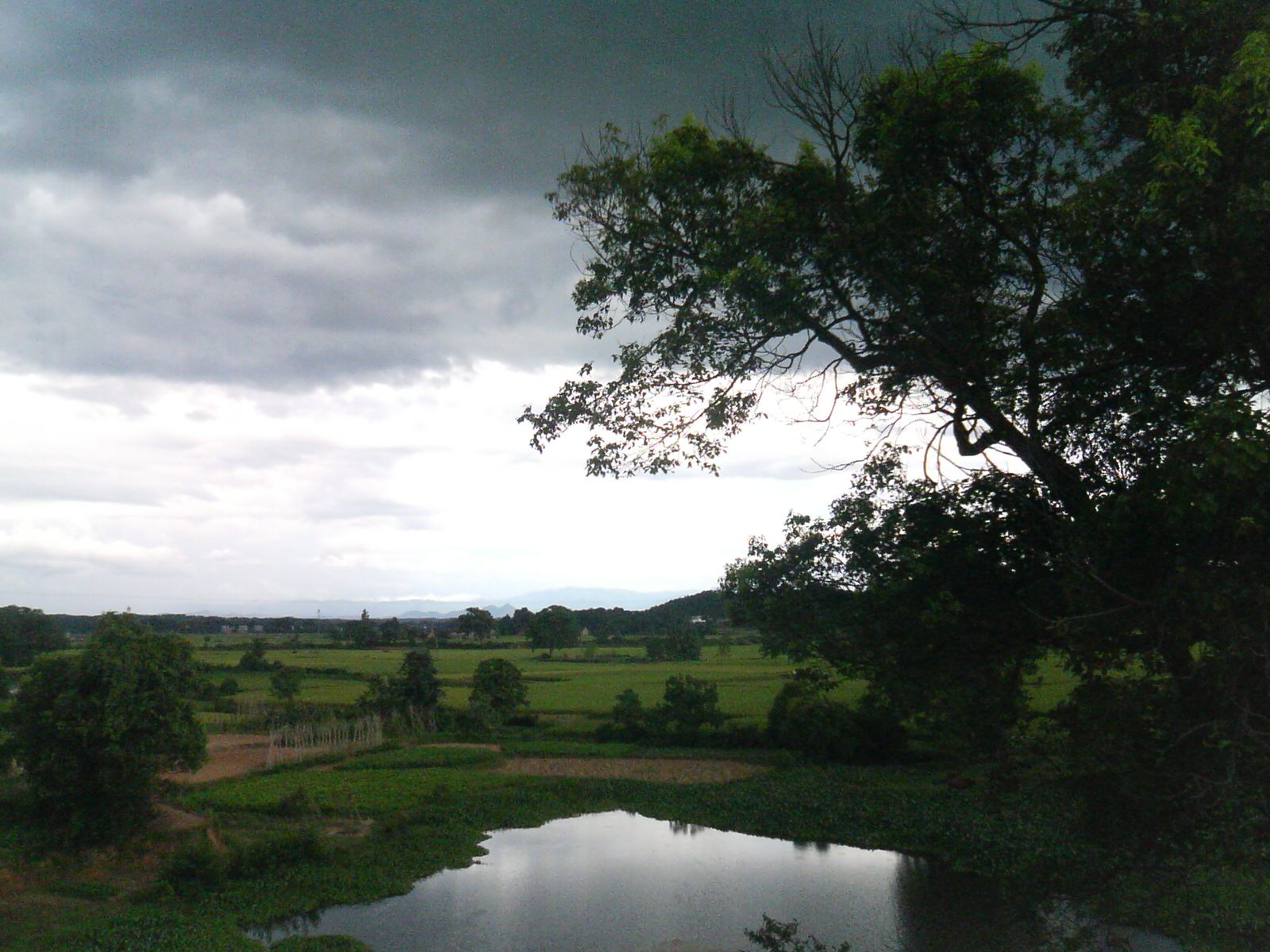 泰和县乡村一景